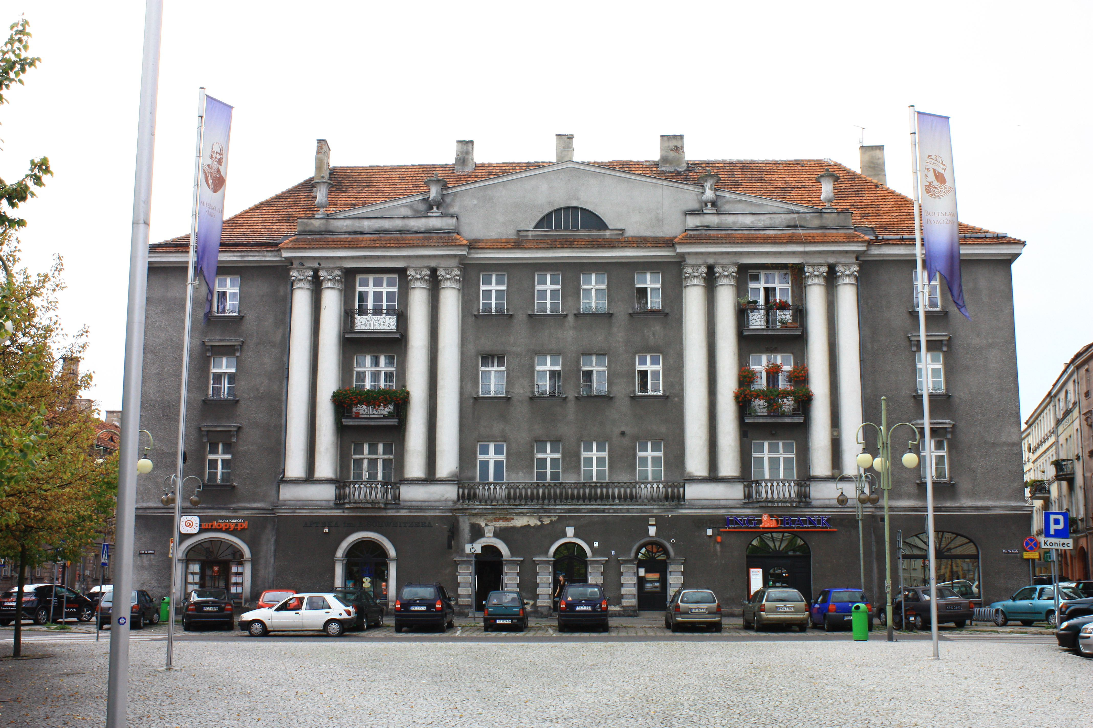 Kalisz, dom, po 1920